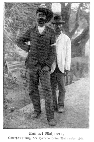 Samuel Maharero, Führer der Herero, im Jahre 1904